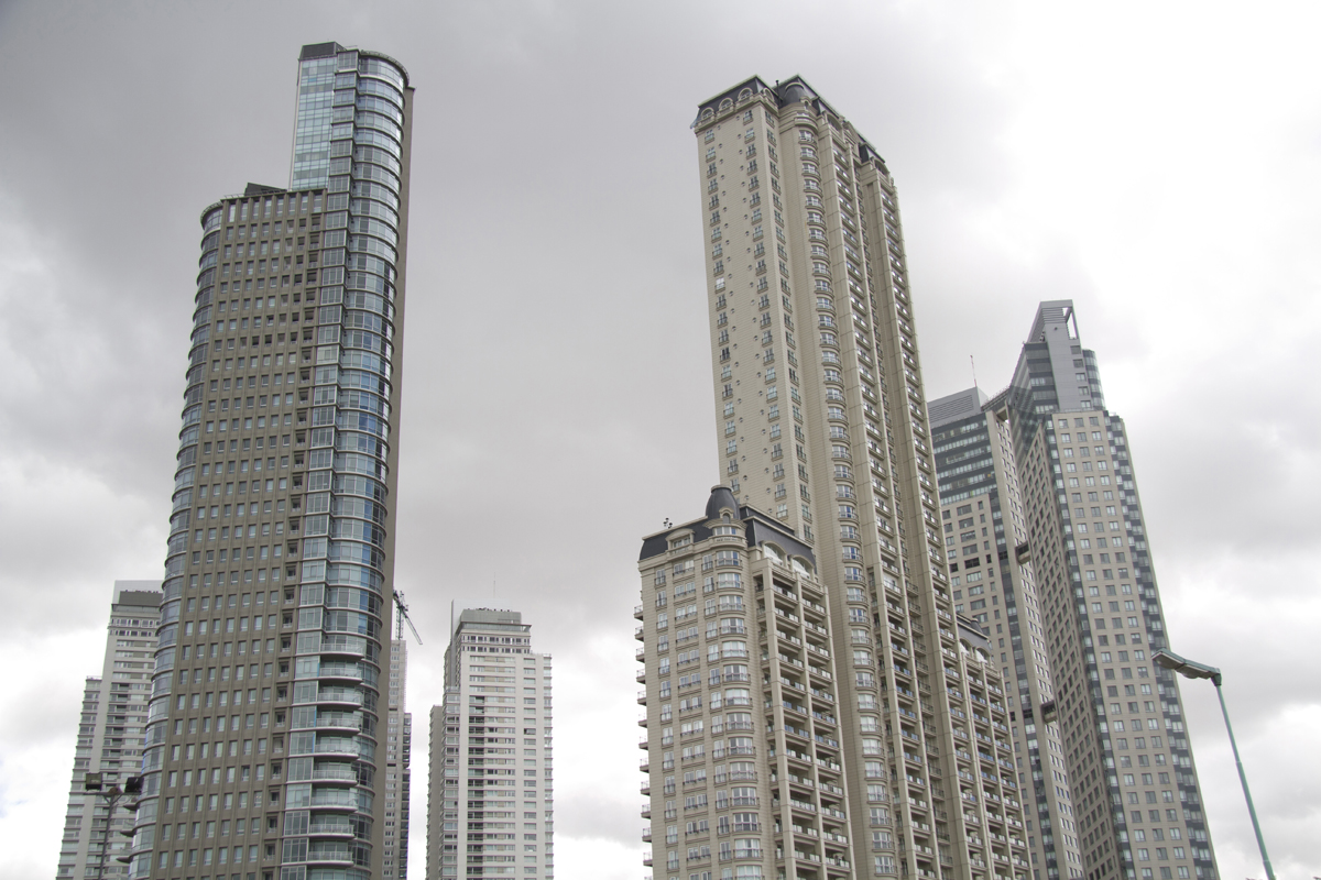 El desarrollo de una nueva relación entre la Ciudad y el río, el reciclado de sus docks, la apertura de nuevas calles y bulevares, la inclusión de parques y hicieron de este barrio uno de los más visitados de Buenos Aires.( Foto: Estrella Herrera)